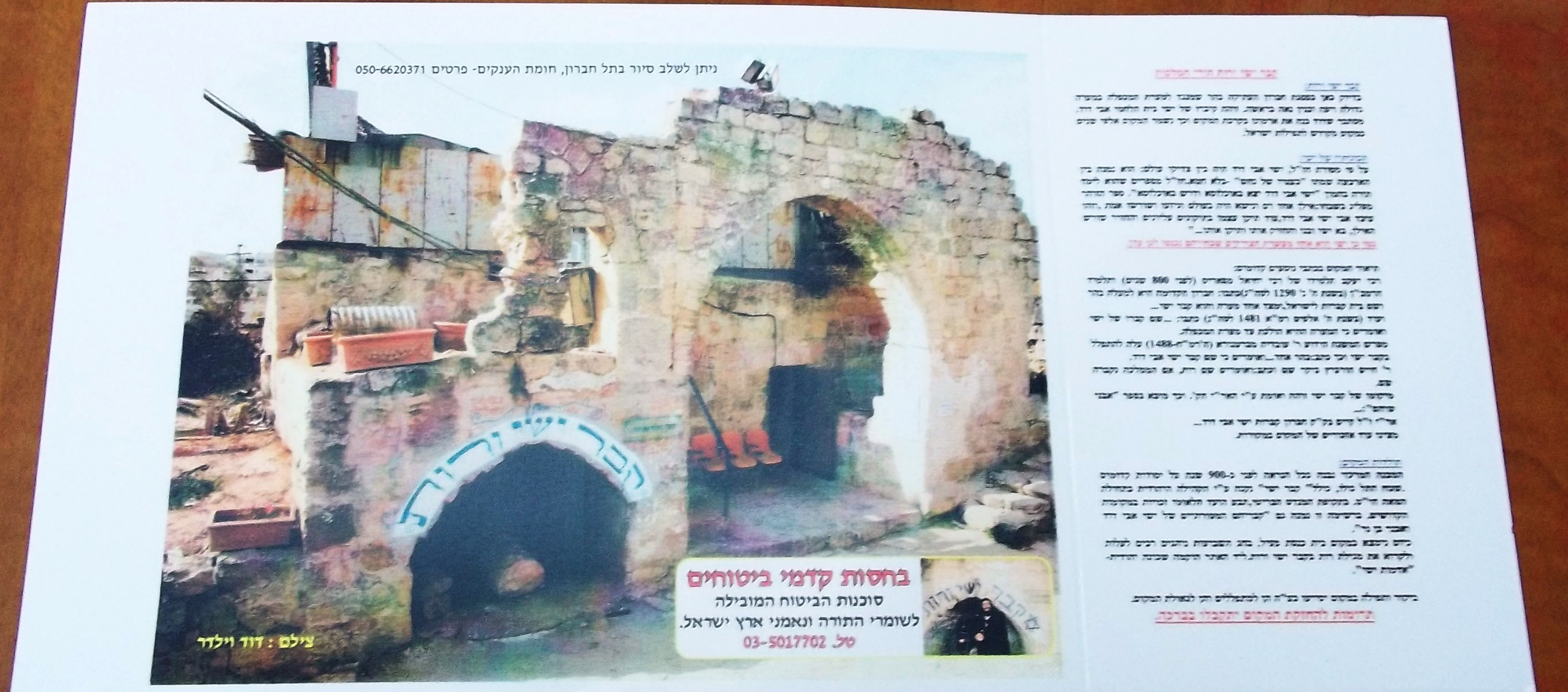 אדמות ישי היא חברון העתיקה